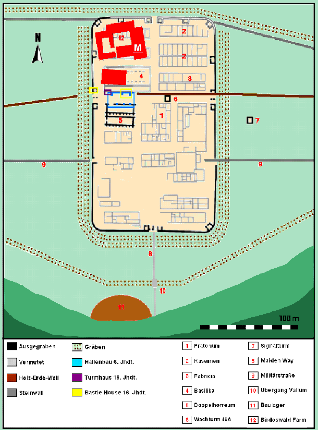 Befundplan des Kastell Birdoswald (Banna), Hadrianswall (GB), 2. bis 6. Jahrhundert n.Chr.